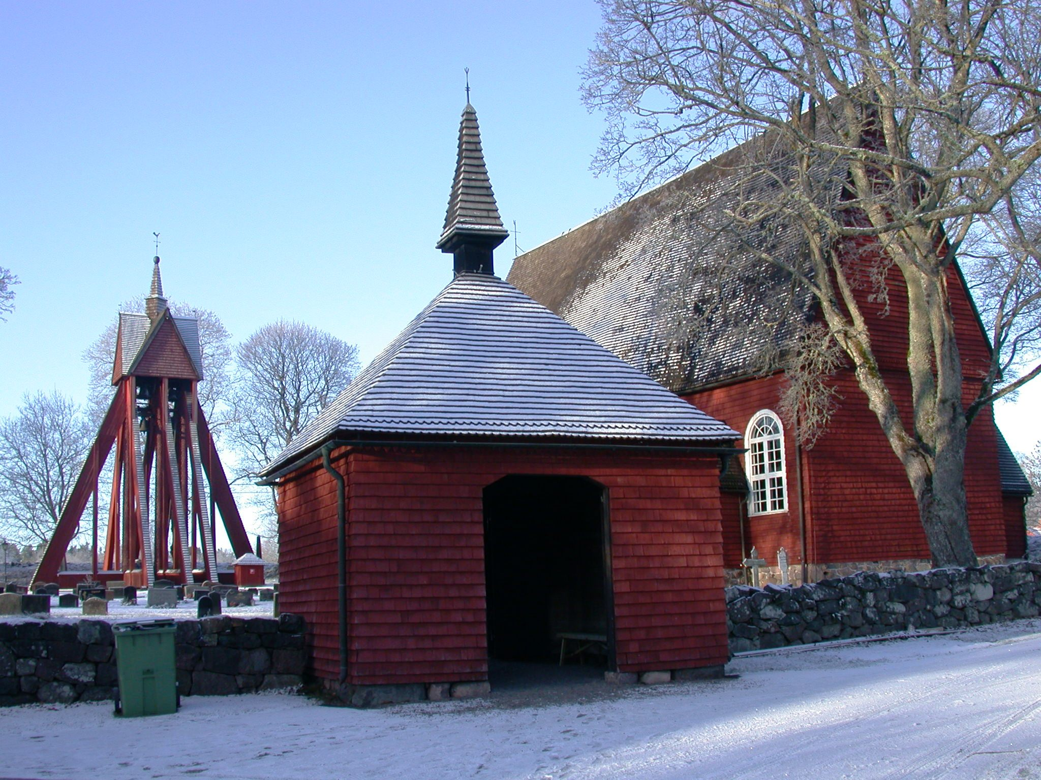 Kråksmåla church, Nybro, Sweden